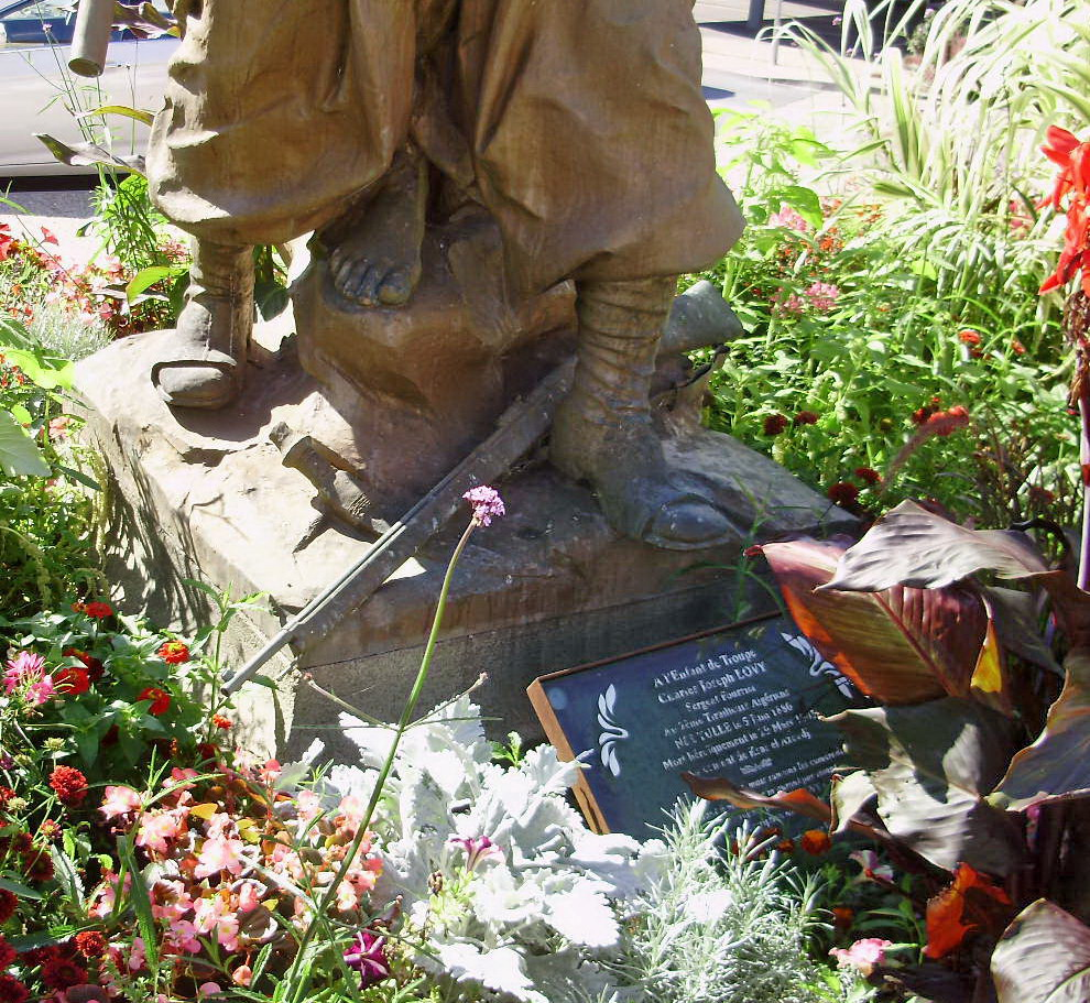 Gros plan sur les pieds de la statue du sergent Lovy à Tulle, avec, à l'avant, la plaque reproduisant le texte qui figurait sur l'ancien piédestal.